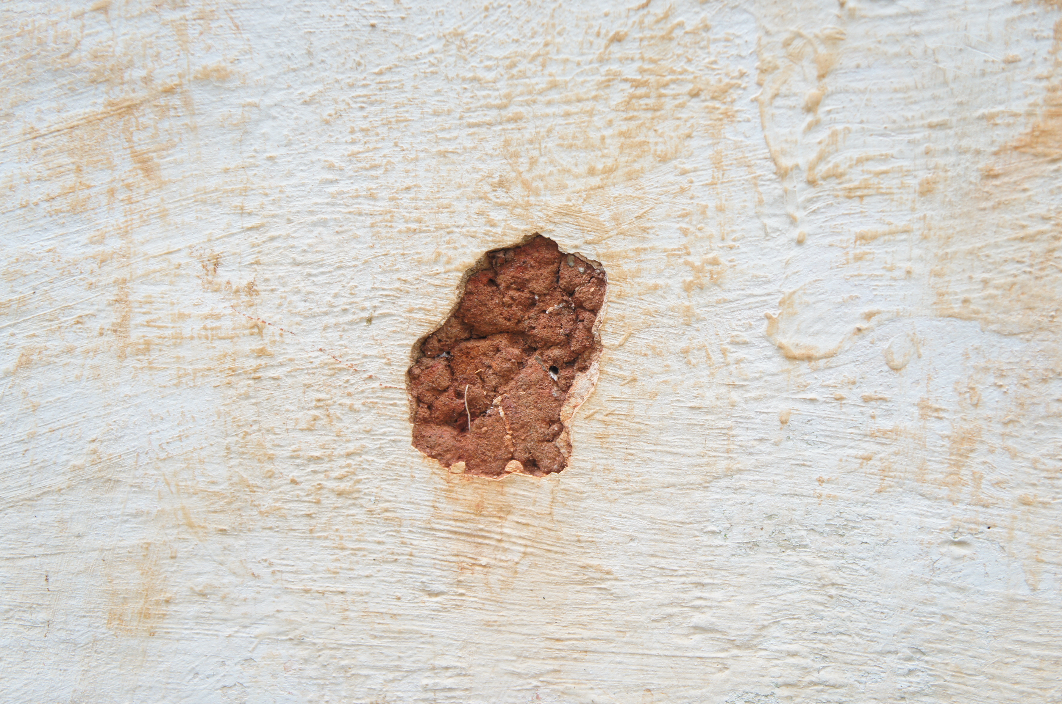 Taipal revelado em falha no muro externo da Casa Sítio da Ressaca, em São Paulo (SP), Brasil.